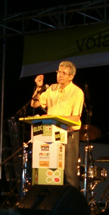 Eberhard Grosske a la festa final de campanya del Bloc per Mallorca.